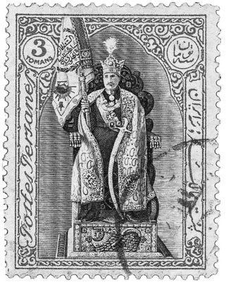 تمبری که به مناسبت تاجگذاری رضاشاه چاپ گردید